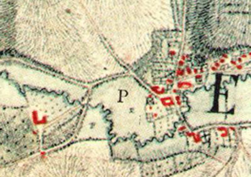 Tranchotkaart Eys